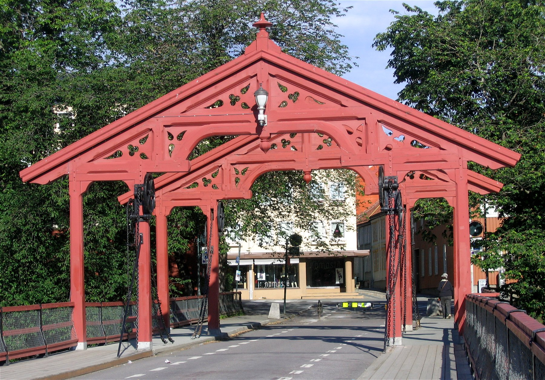 Holzbrücke Gamle bybro in Trondheim, Norwegen